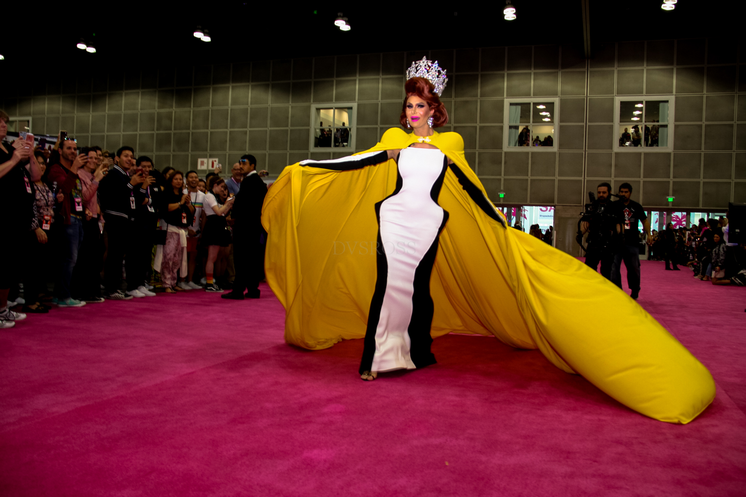 Rupaul DragCon 2019 - Los Angeles